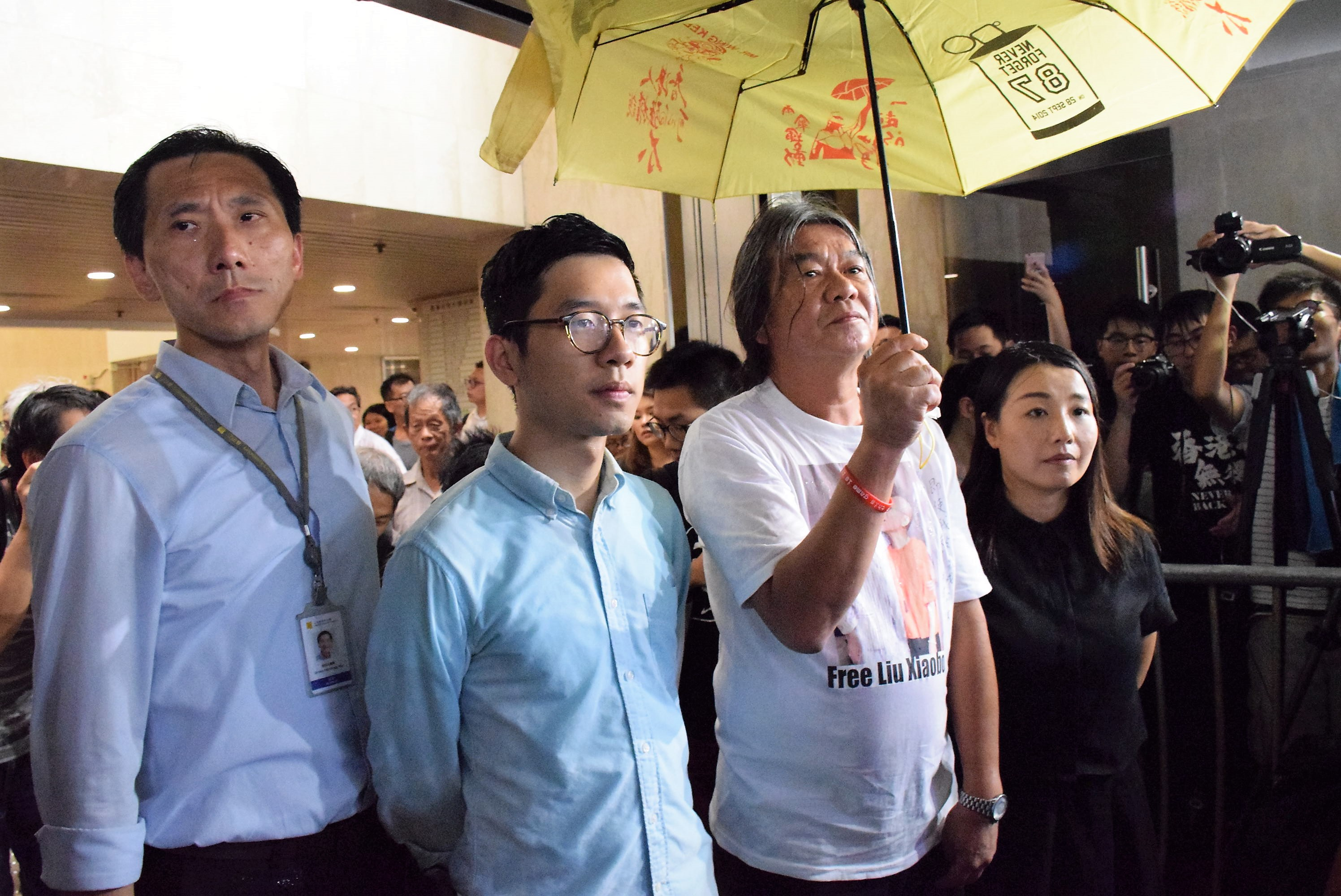 中文（香港）: 4名被法庭取消資格的民主派立法會議員 (左起﹕姚松炎、羅冠聰、梁國雄與劉小麗﹐ 攝影﹕美國之音記者湯惠芸))